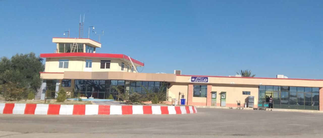 فرودگاه جهرم واقع در شمال شهر جهرم